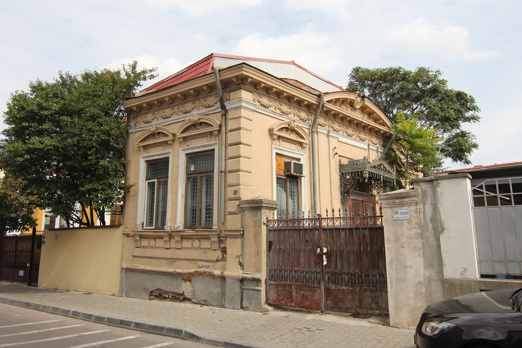 Casă pe Str Romulus